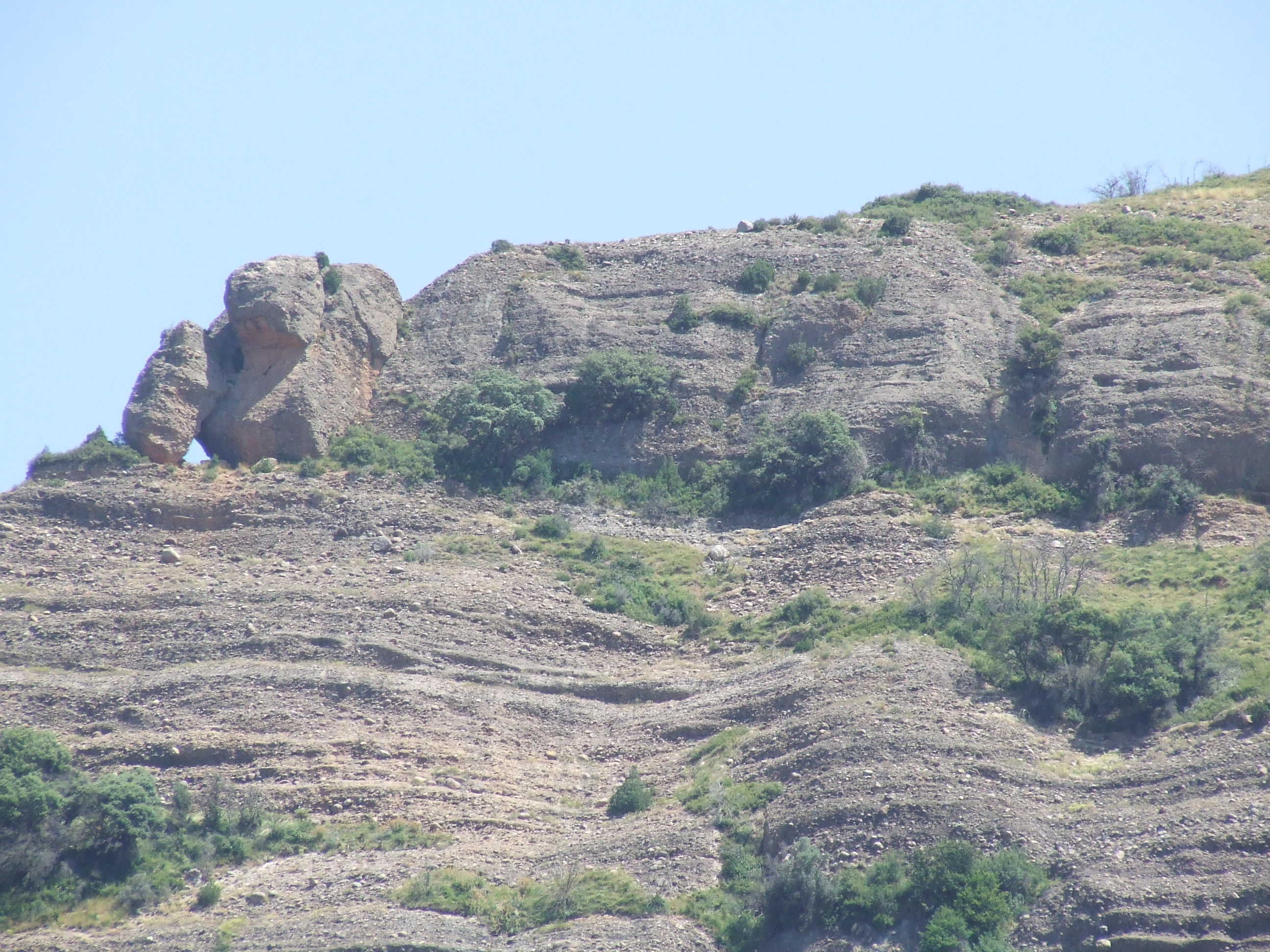 La roca foradada que dóna nom a la Roca Foradada (la Pobla de Segur, Pallars Jussà)